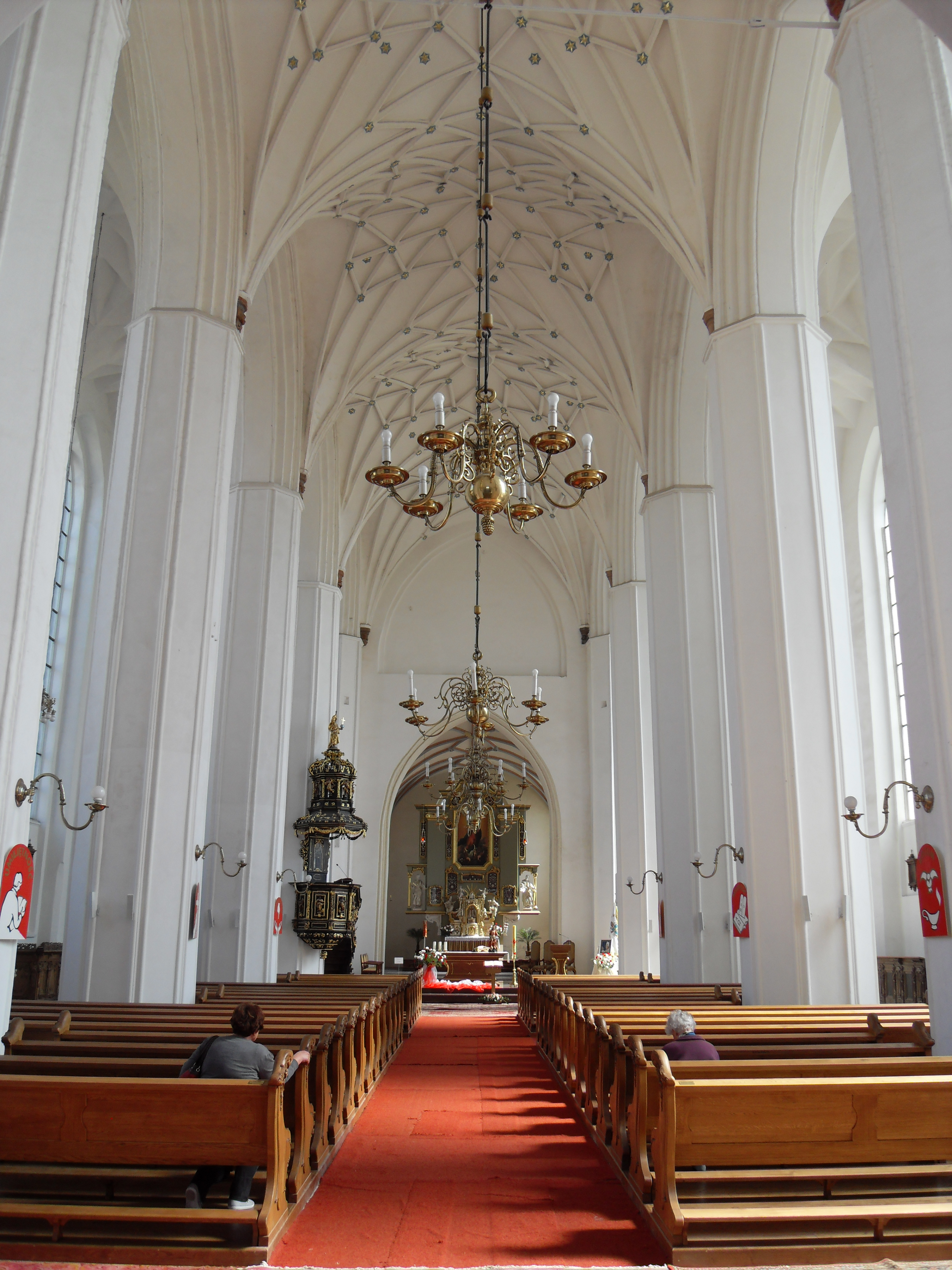 Gdańsk Stare Przedmieście, kościół św. Piotra i Pawła.